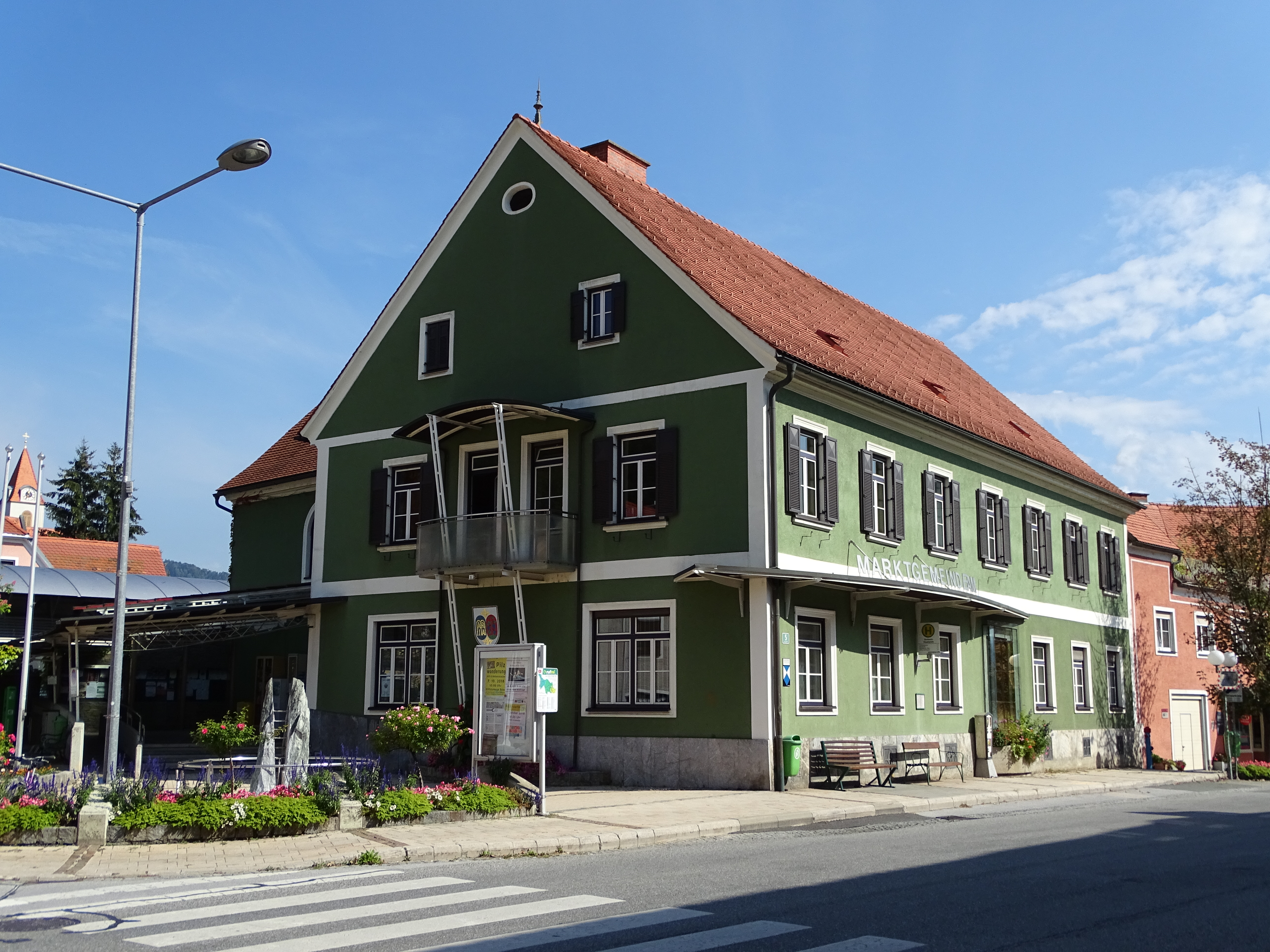 Das ehemalige Marktgemeindeamt von Gratwein. Es dient heute als eines der zwei Verwaltungszentren der Marktgemeinde Gratwein-Straßengel